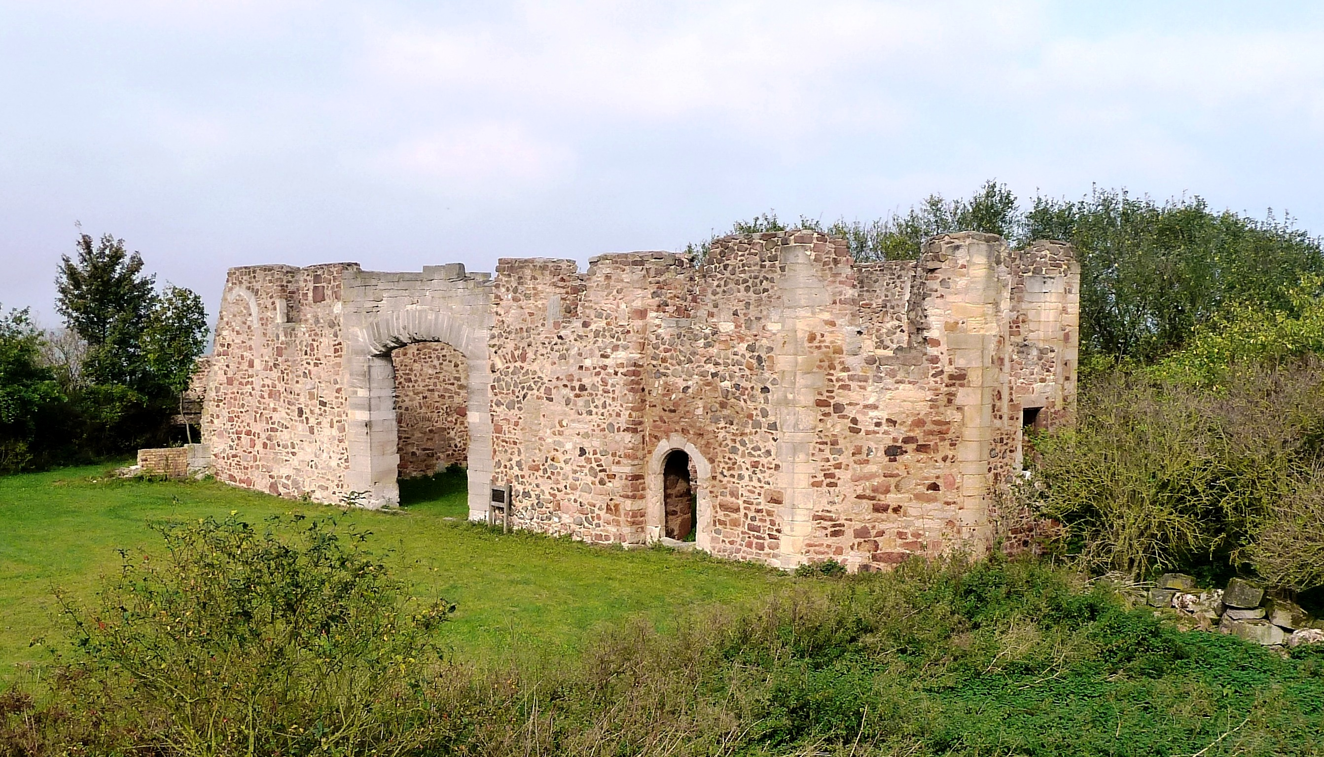 Ruine der ehemaligen Klosterkirche. "Die Kartause Eppenberg ist eine Klosterruine in der Nähe von Gensungen, einem Ortsteil der Stadt Felsberg in Nordhessen, die heute noch nach den zuletzt im Kloster Eppenberg lebenden Kartäuser-Mönchen „Kartause“ genannt wird. In der Nähe befindet sich die Staatsdomäne Mittelhof." Wikipedia